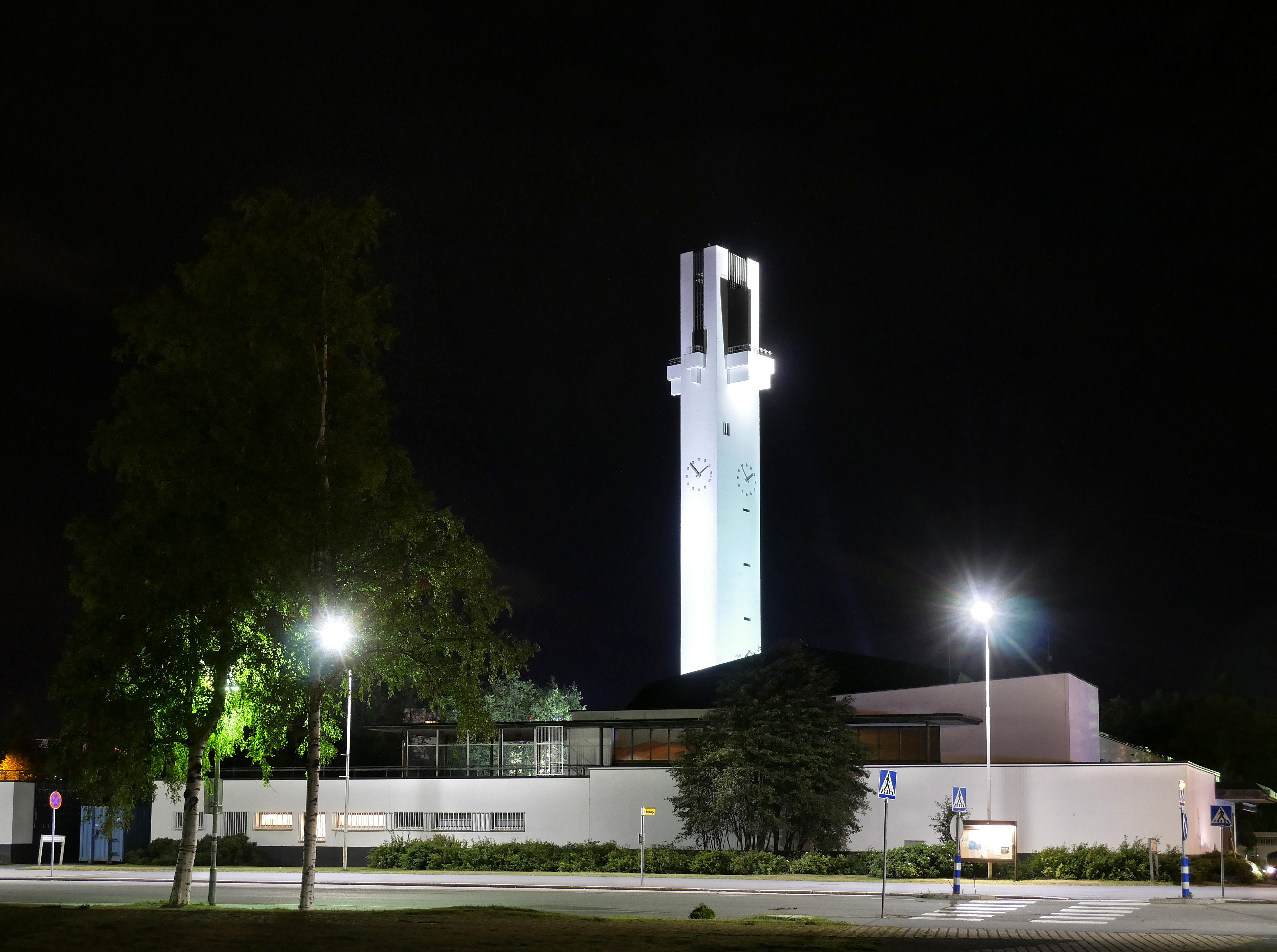 Seinäjoen seurakuntakeskus kuvattuna yöllä.